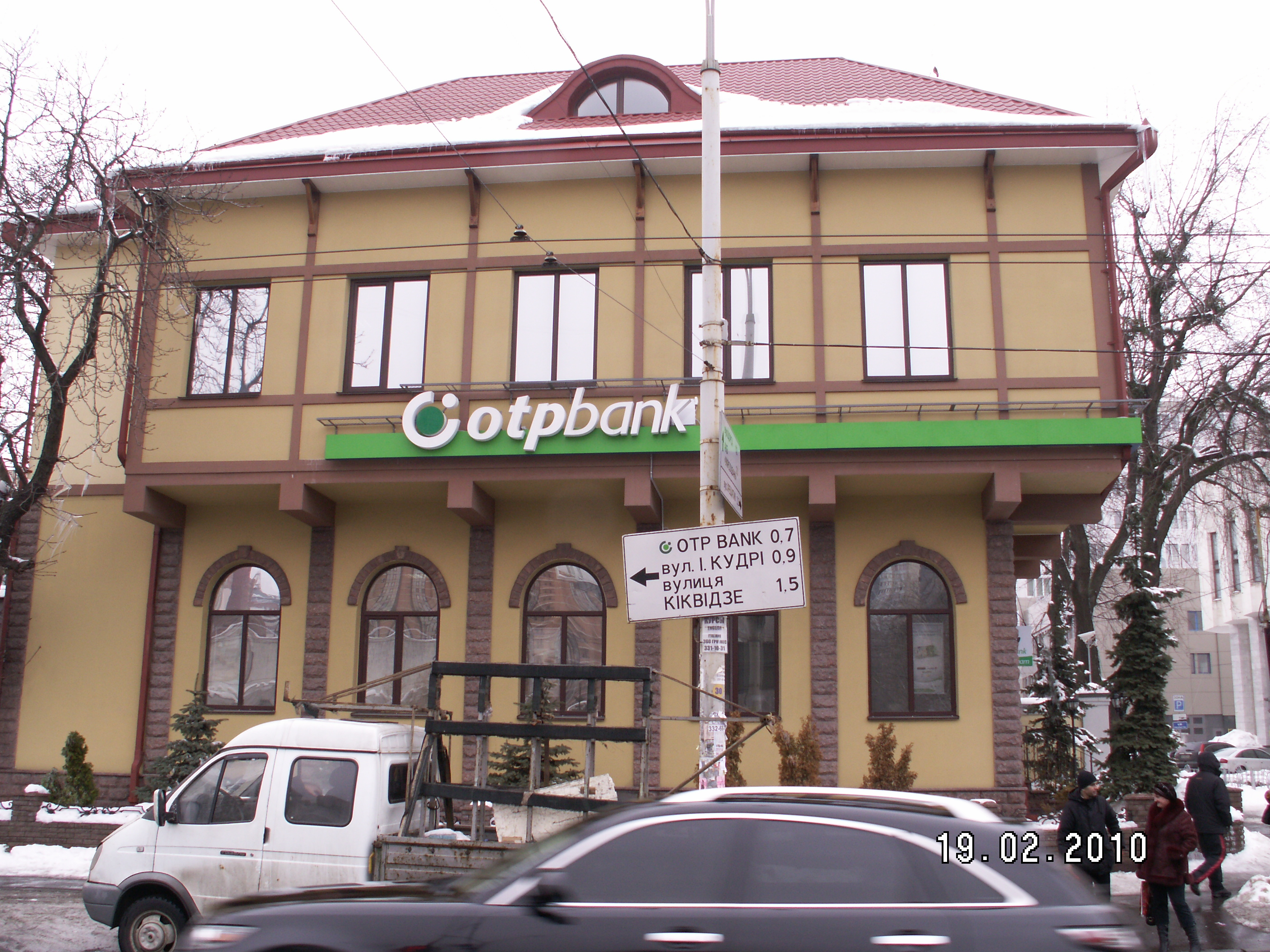 Отделение OTPbank